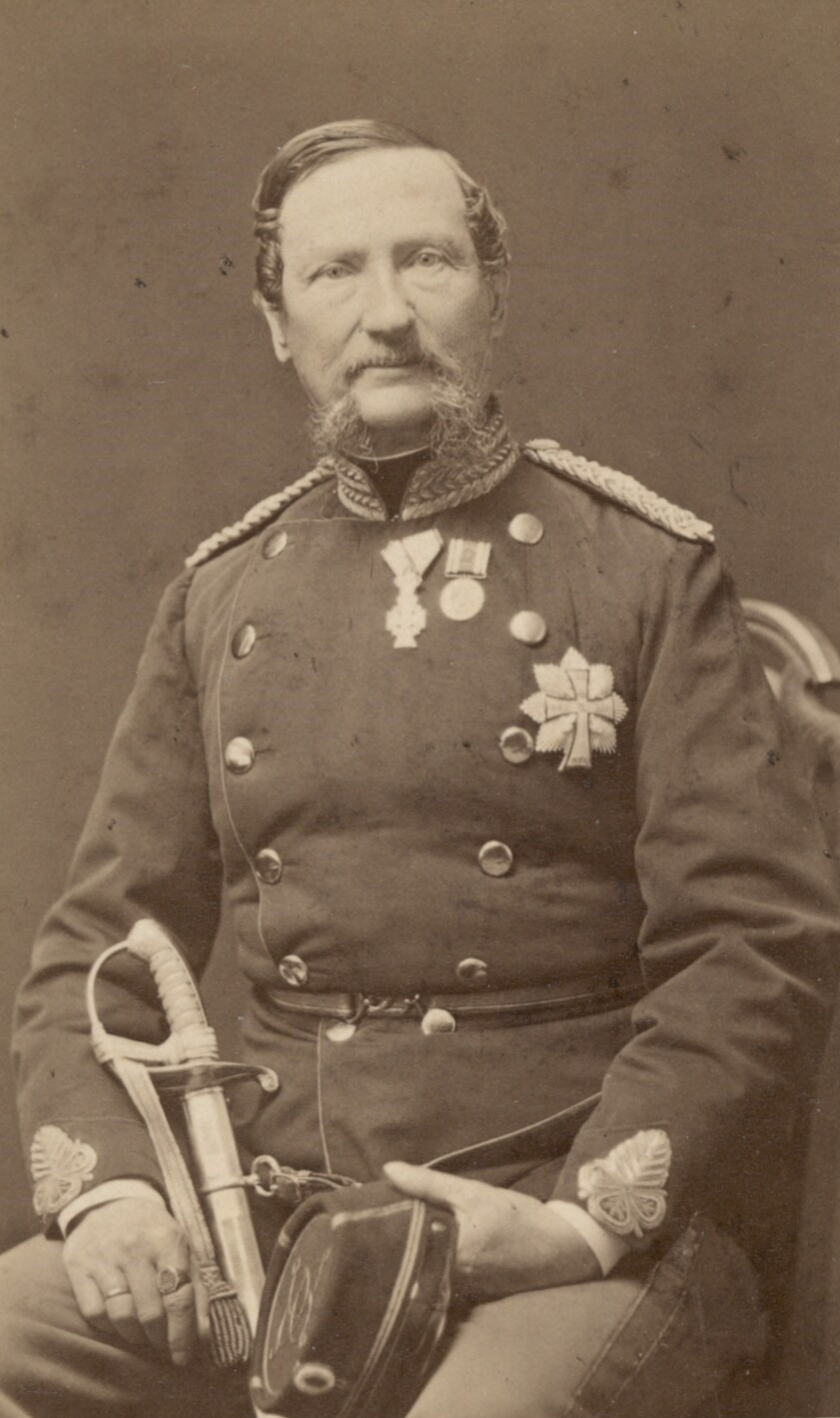 Georg Julius Wilhelm Nielsen (1811-1891), Danish general